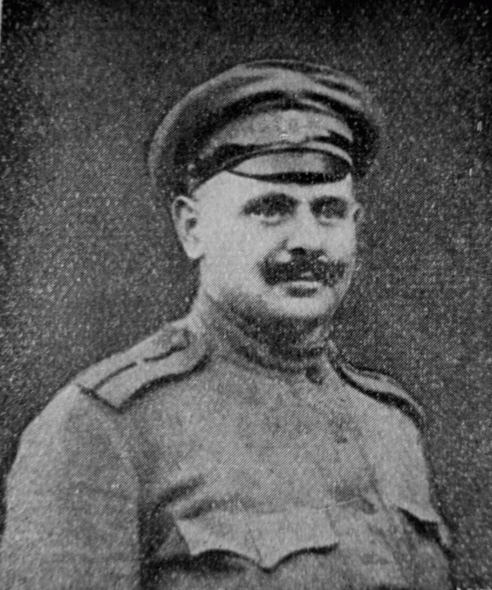 Jan Bohumír Syrový (* 24. ledna 1888 Třebíč – 17. října 1970 Praha) byl československý voják, příslušník a velitel Československých legií v Rusku a předseda československé vlády v období Mnichovské dohody od 22. září do 30. listopadu 1938. Na fotografii jako první český dobrovolník - důstojník československých legií v Rusku. Foto před rokem 1919.